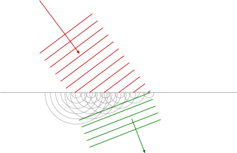 Beschreibung: Huygenssches Prinzip - Brechung einer ebenen Wellenfront